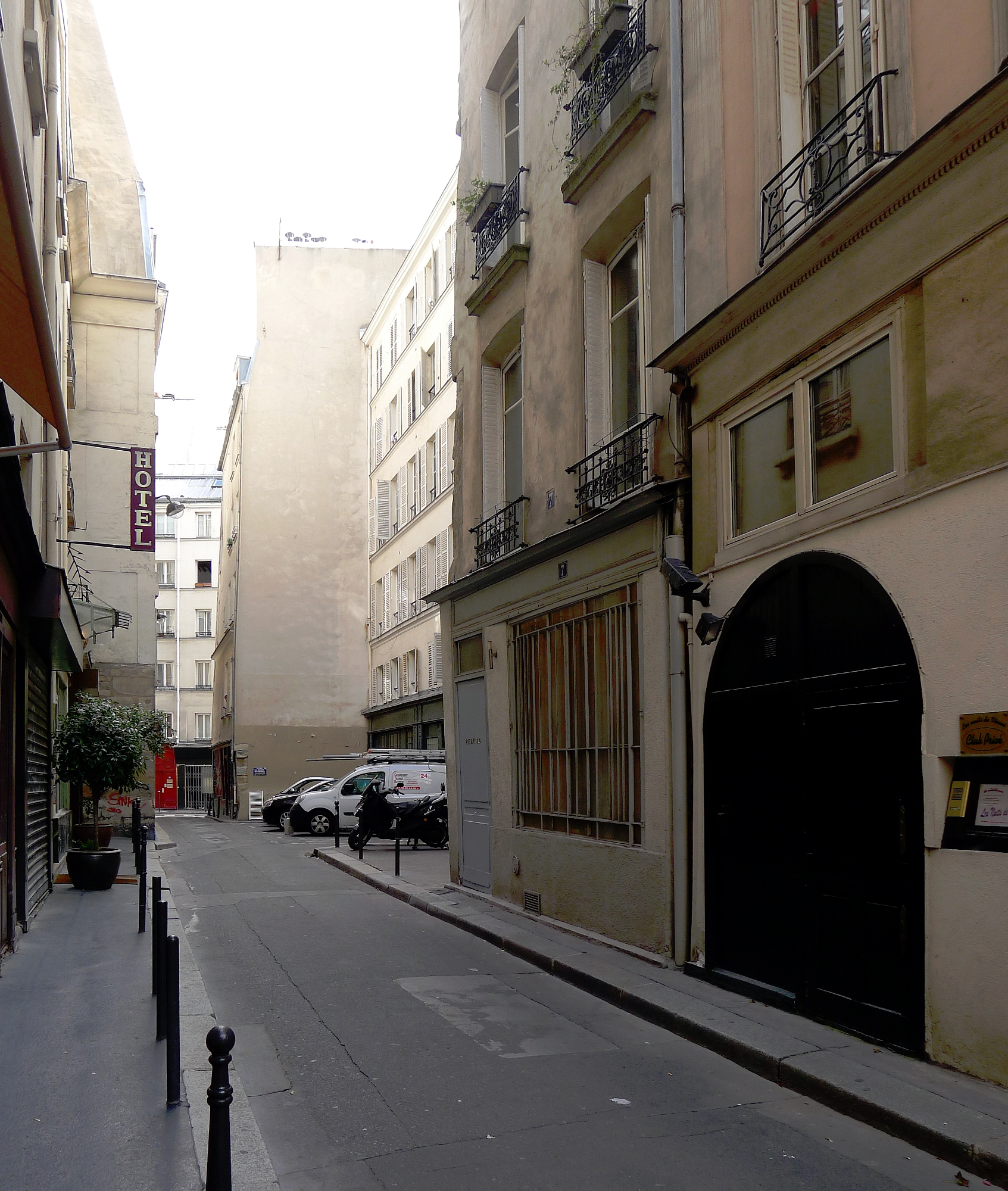 Rue du Pélican - Paris Ier